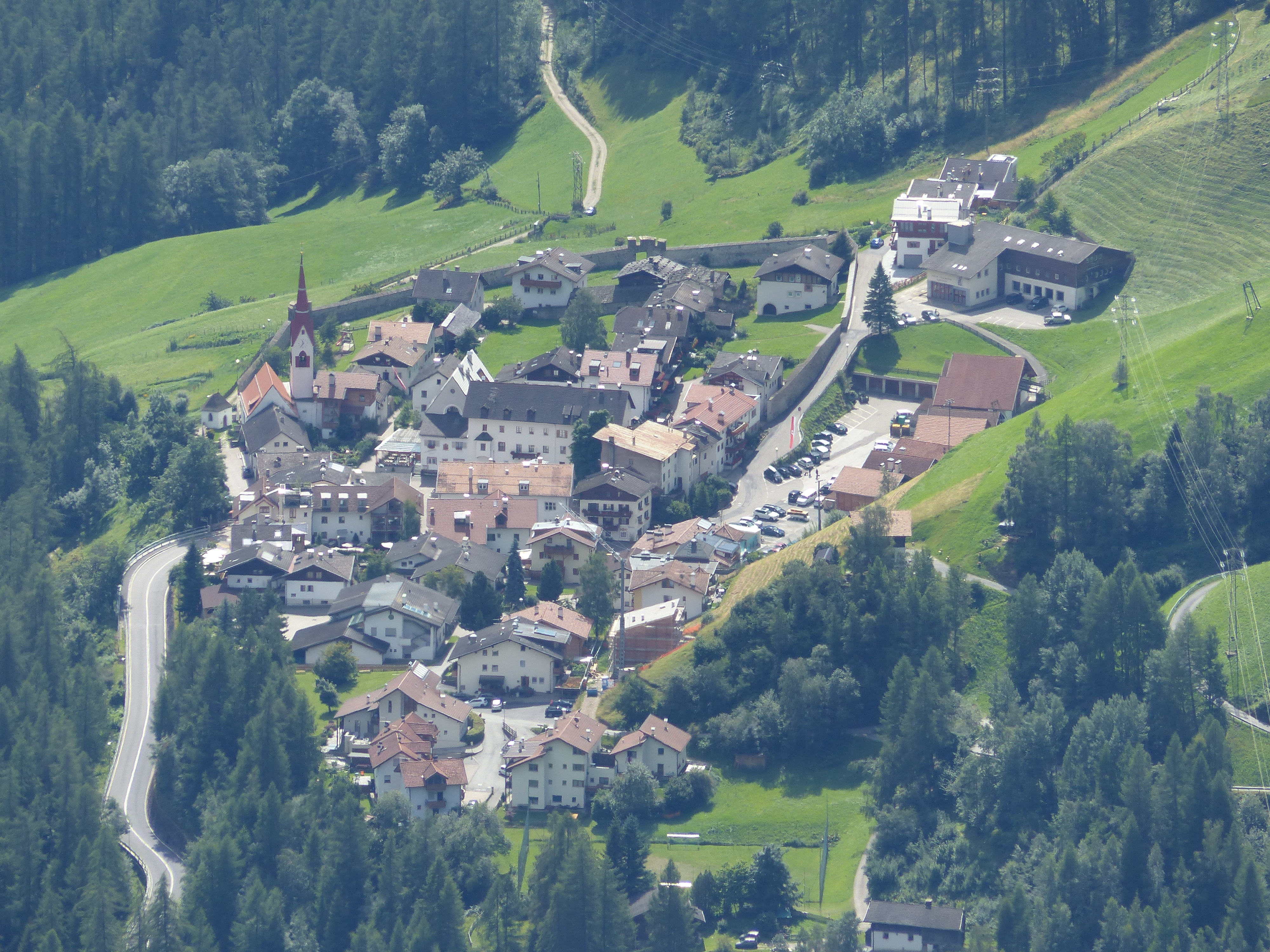 Karthaus mit Kartause Allerengelberg im hinteren Teil